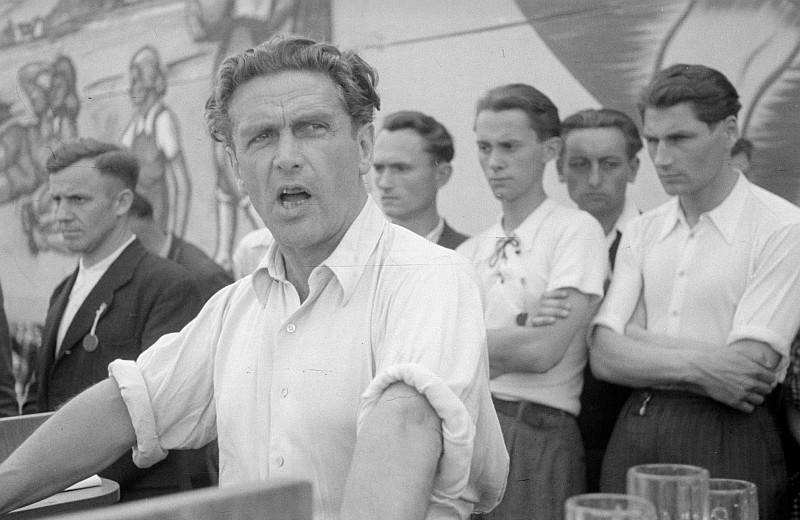 Original image description from the Deutsche Fotothek Pfingsten 1947